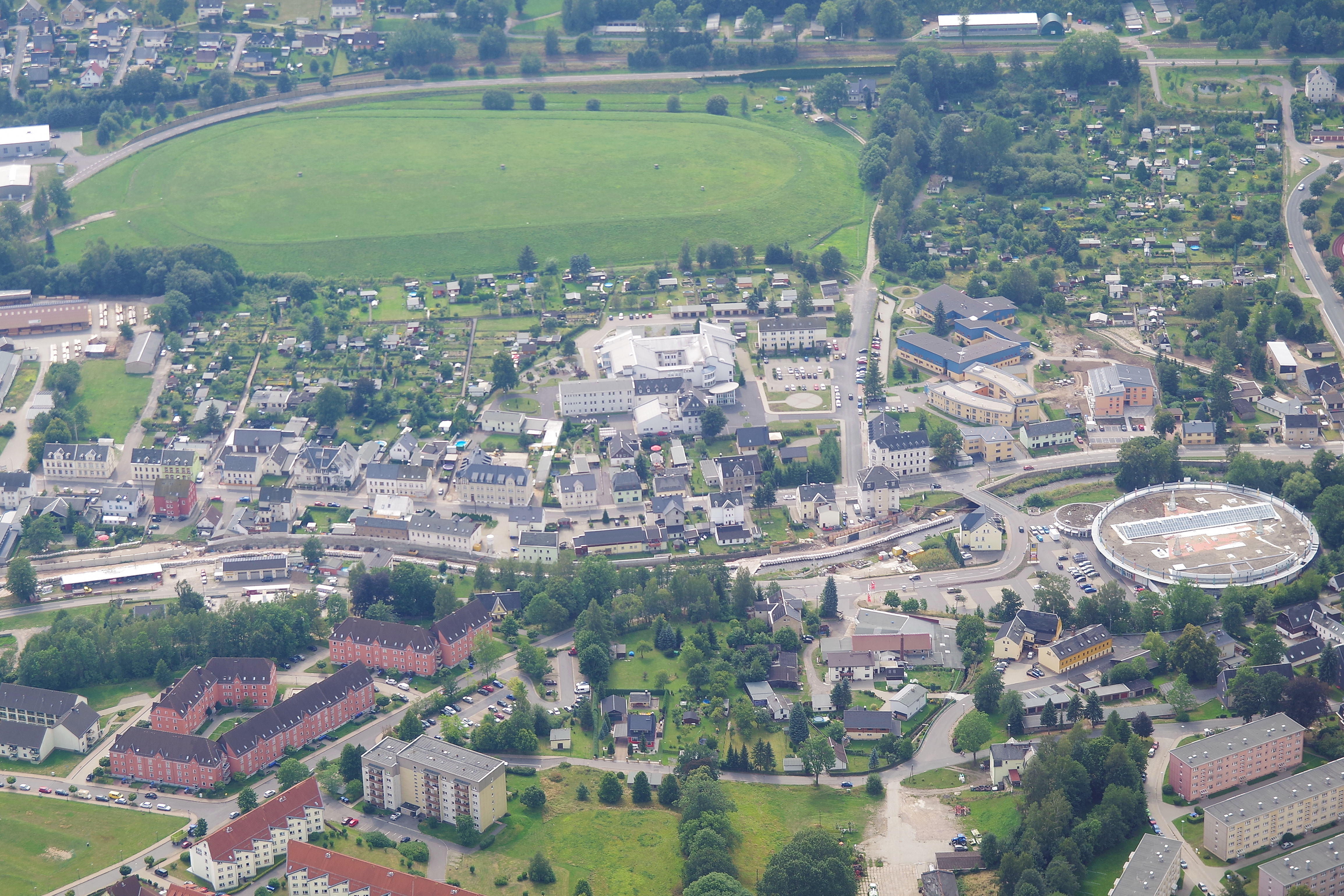 Olbernhau